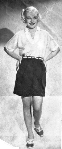 MurielEvans